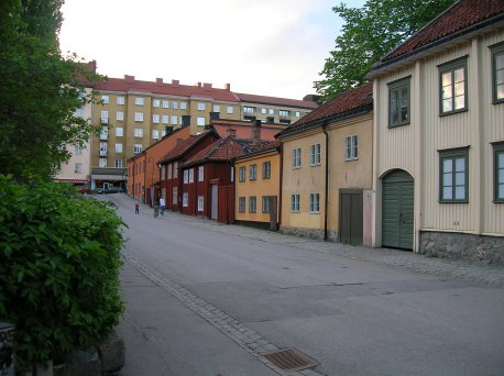 1700-talshus vid Nytorget, Stockholm. Fotograf : Jordgubbe. Juni 2005 Public Domain